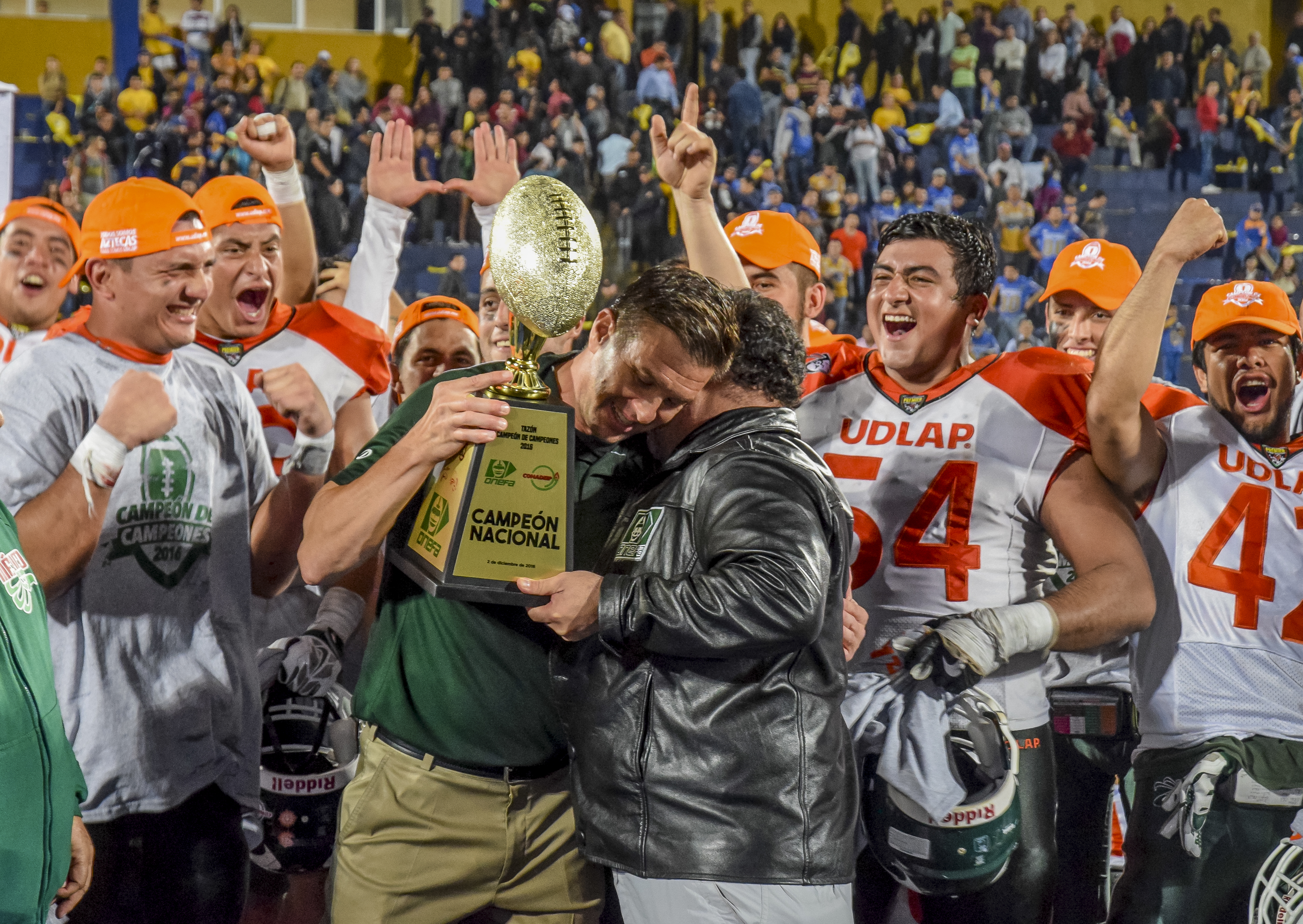 Entrega del trofeo de campeón de campeones al Head Coach Eric Fisher; partido disputado en Monterrey, N.L., entre los Aztecas de la UDLAP y los Auténticos Tigres de la UANL el cual finalizó con marcador de 34 puntos a 27 a favor de los Aztecas.